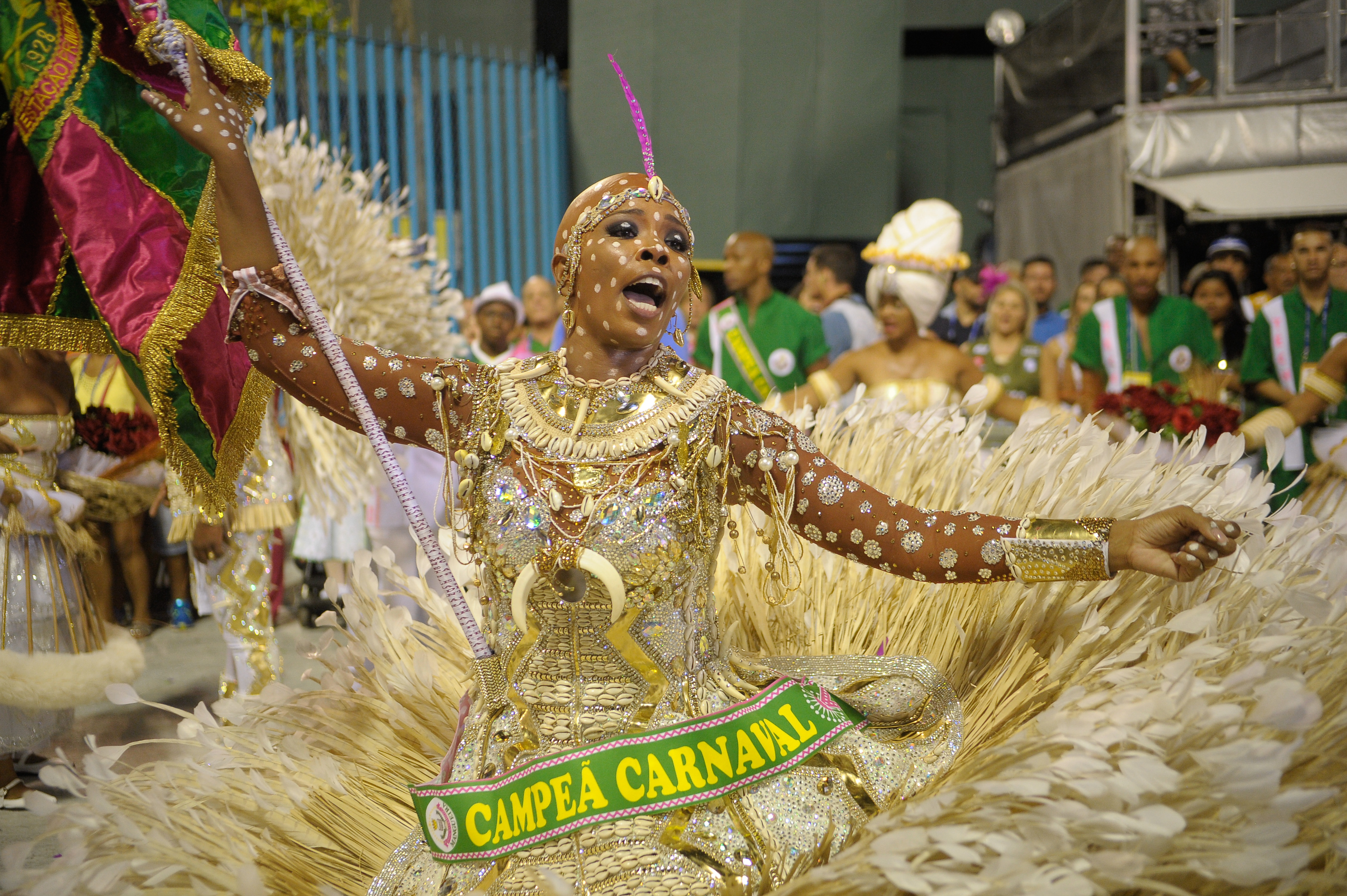 Rio de Janeiro - Mangueira, a grande vitoriosa do carnaval foi a última escola a se apresentar na Marquês de Sapucaí, no desfile das campeãs, com o enredo sobre a Maria Bethânia (Tomaz Silva/Agência Brasil)